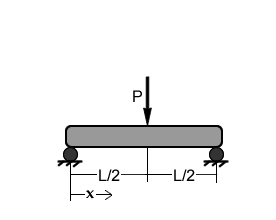 Viga con carga concentrada a la mitad Mecánica de materiales